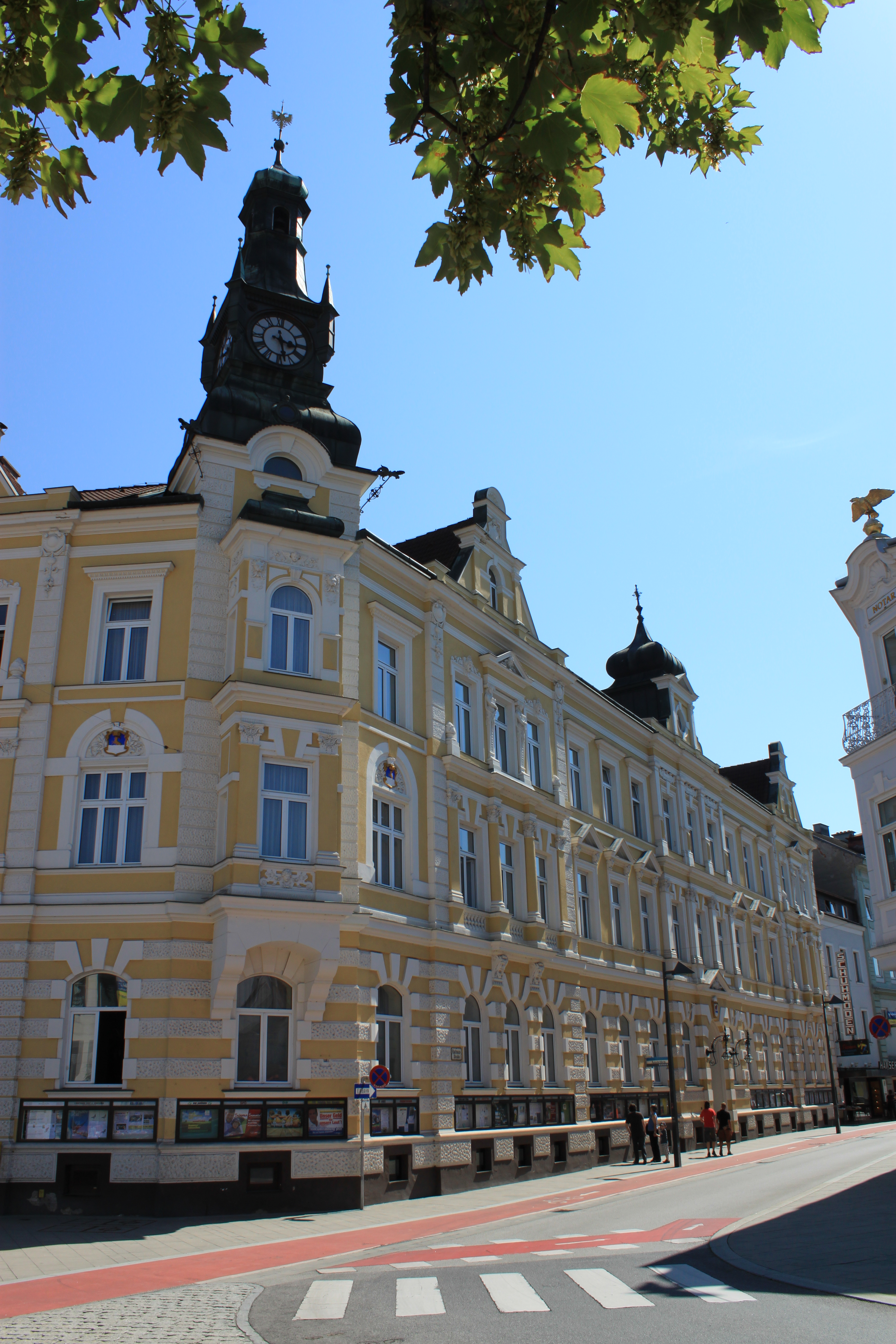 Amstettner Rathaus, Rathausstraße 1, 3300 Amstetten